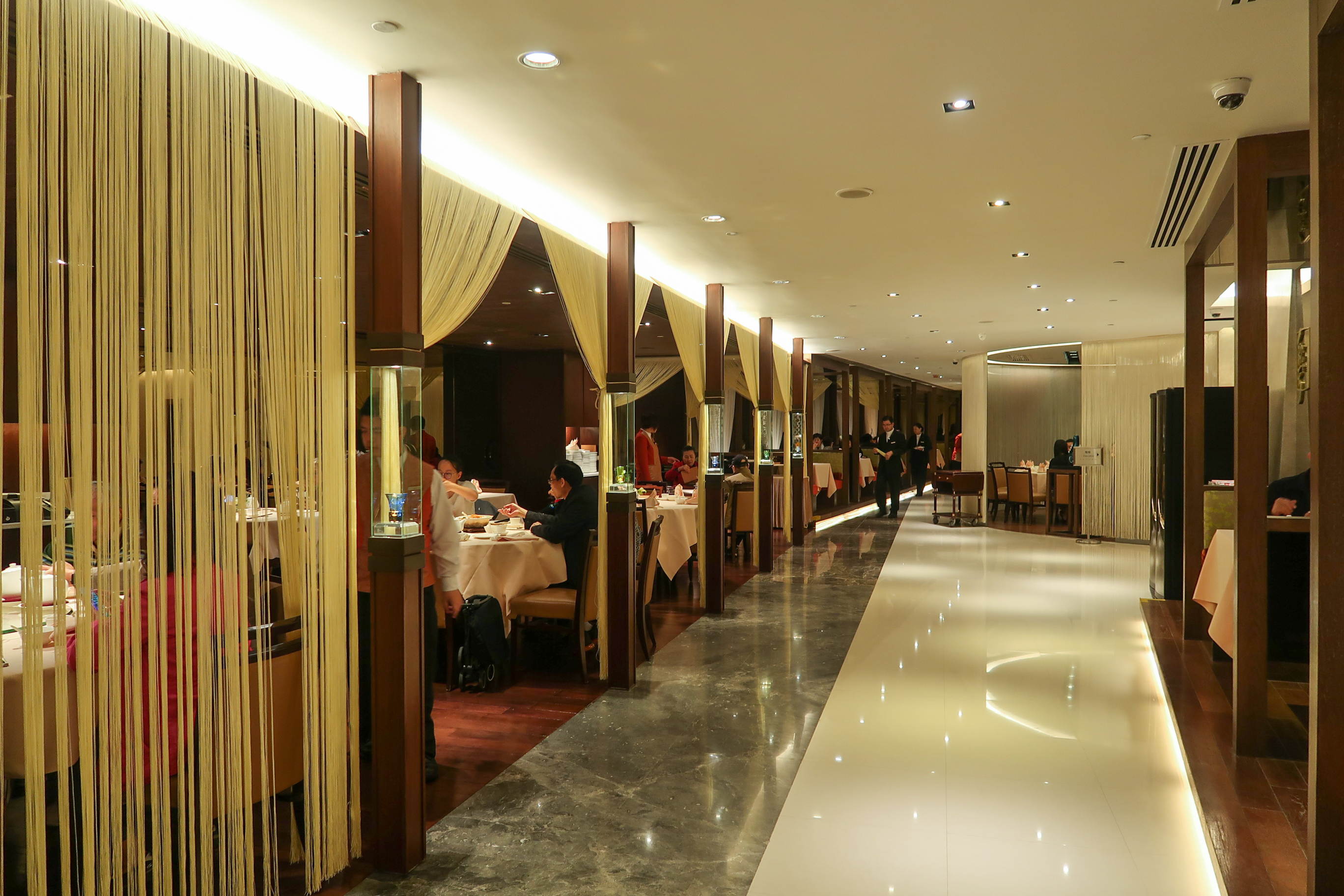 City Garden Hotel Garden YUE Restaurant